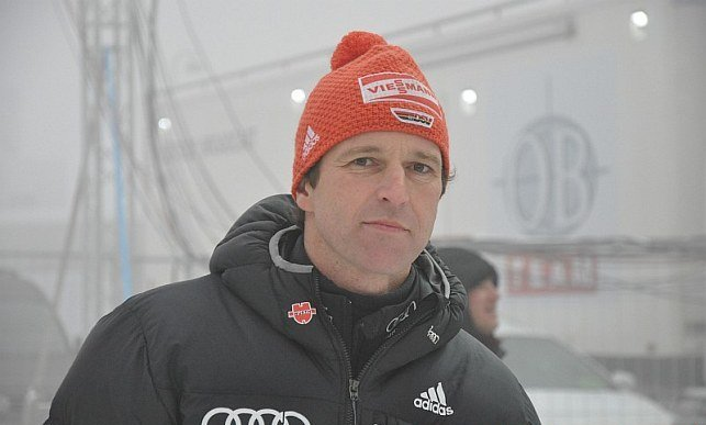 Werner Schuster podczas konkursu indywidualnego kobiet na skoczni normalnej na Mistrzostwach Świata w Narciarstwie Klasycznym 2011 w Oslo.